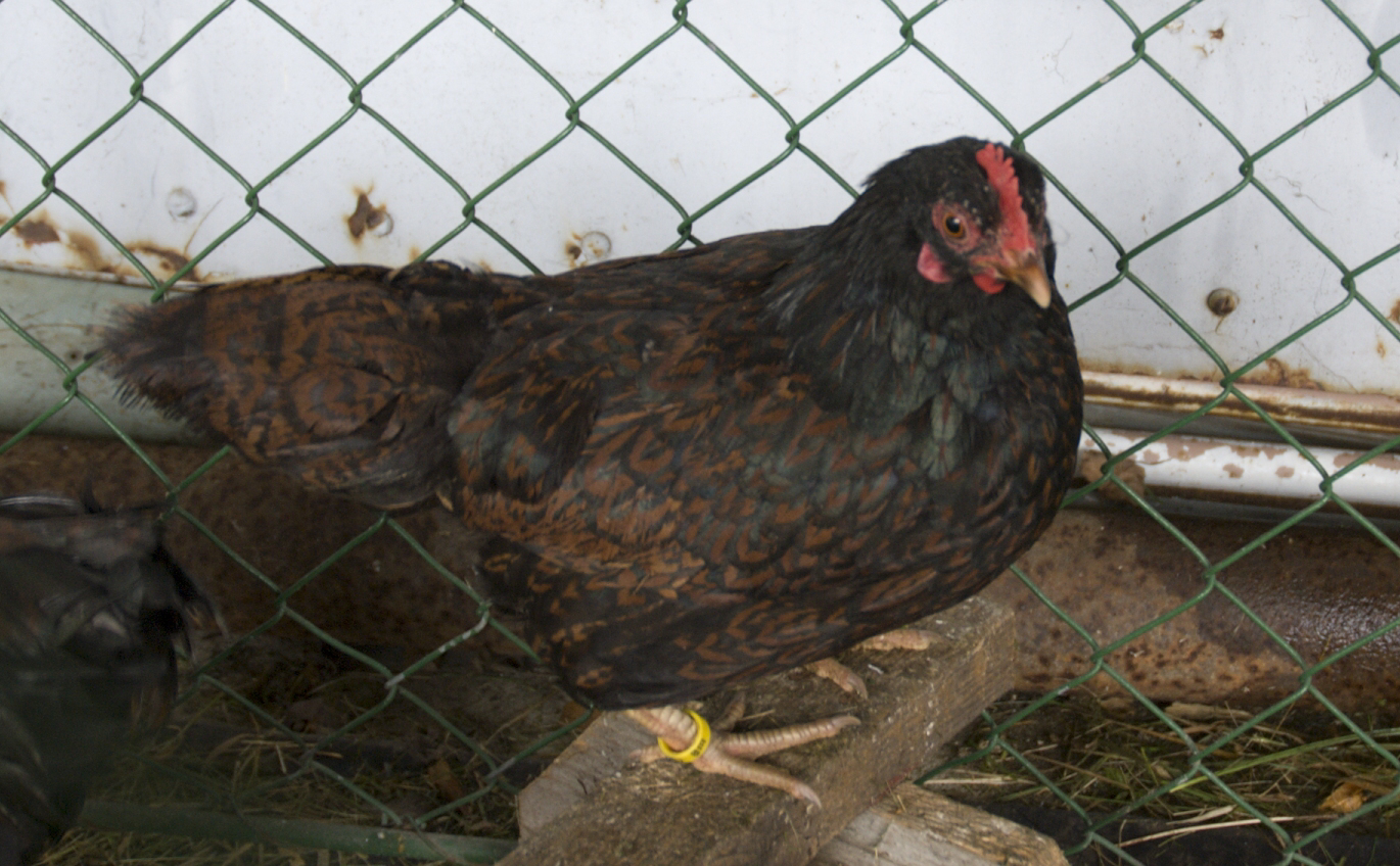 slepice zdrobnělé barneveldky